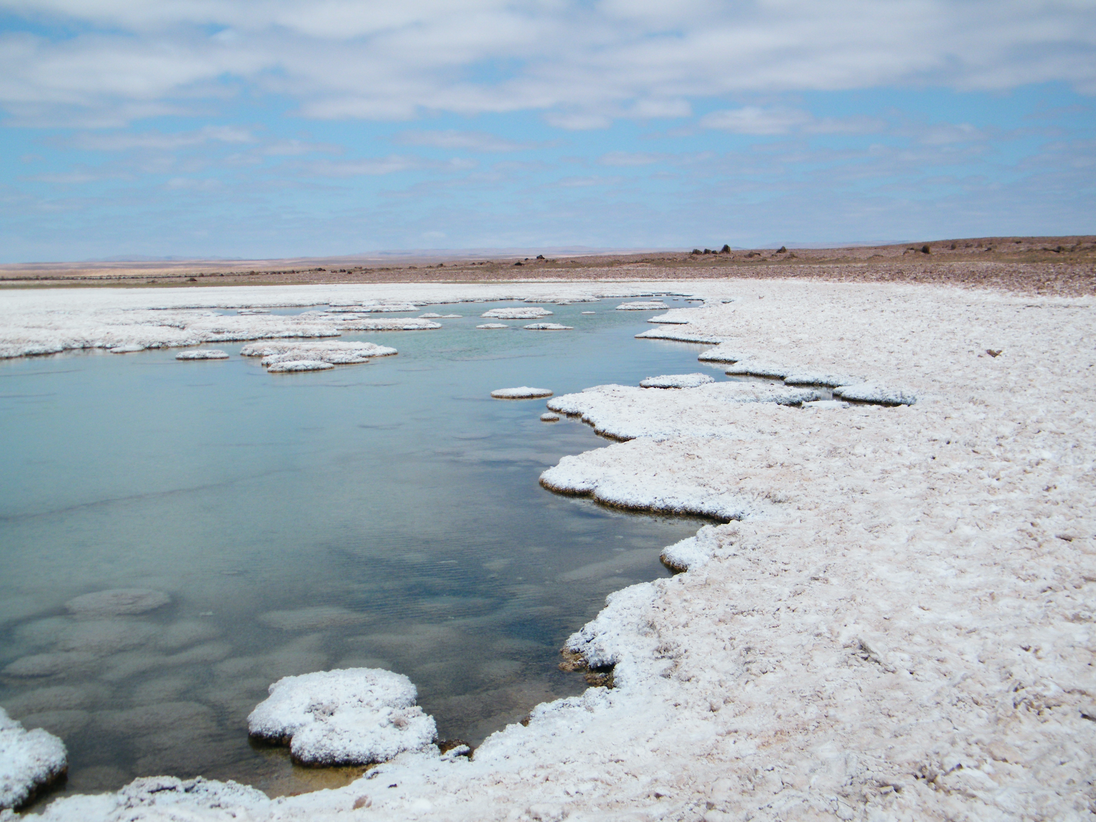 Salar de Llamara